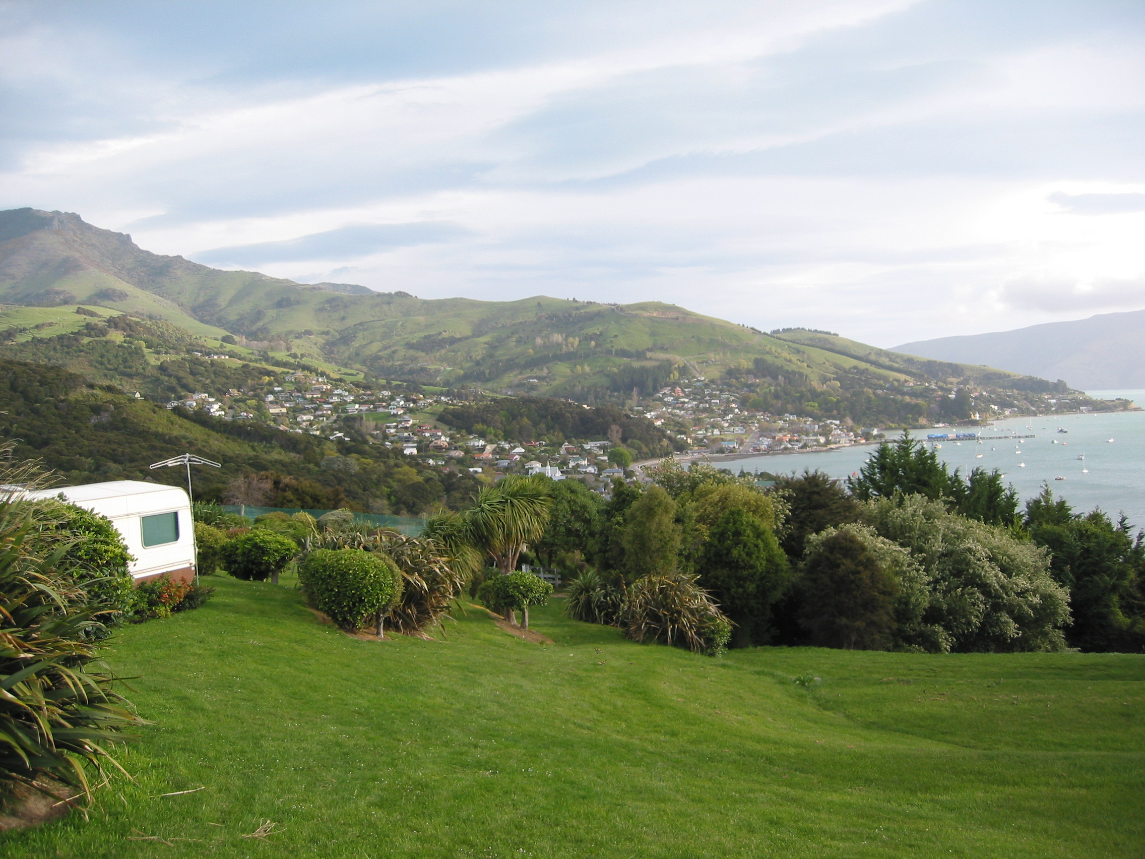 Akaroa